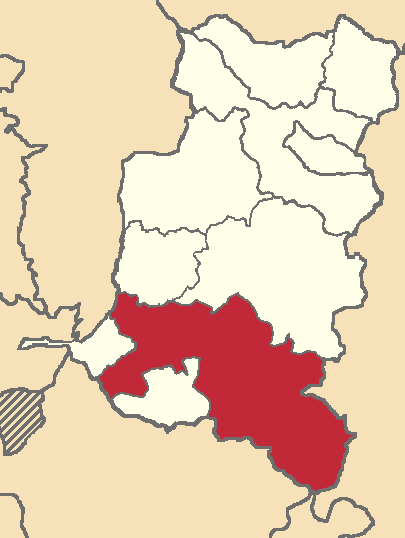 Mapa localizacor del cantón en Chimborazo, Ecuador